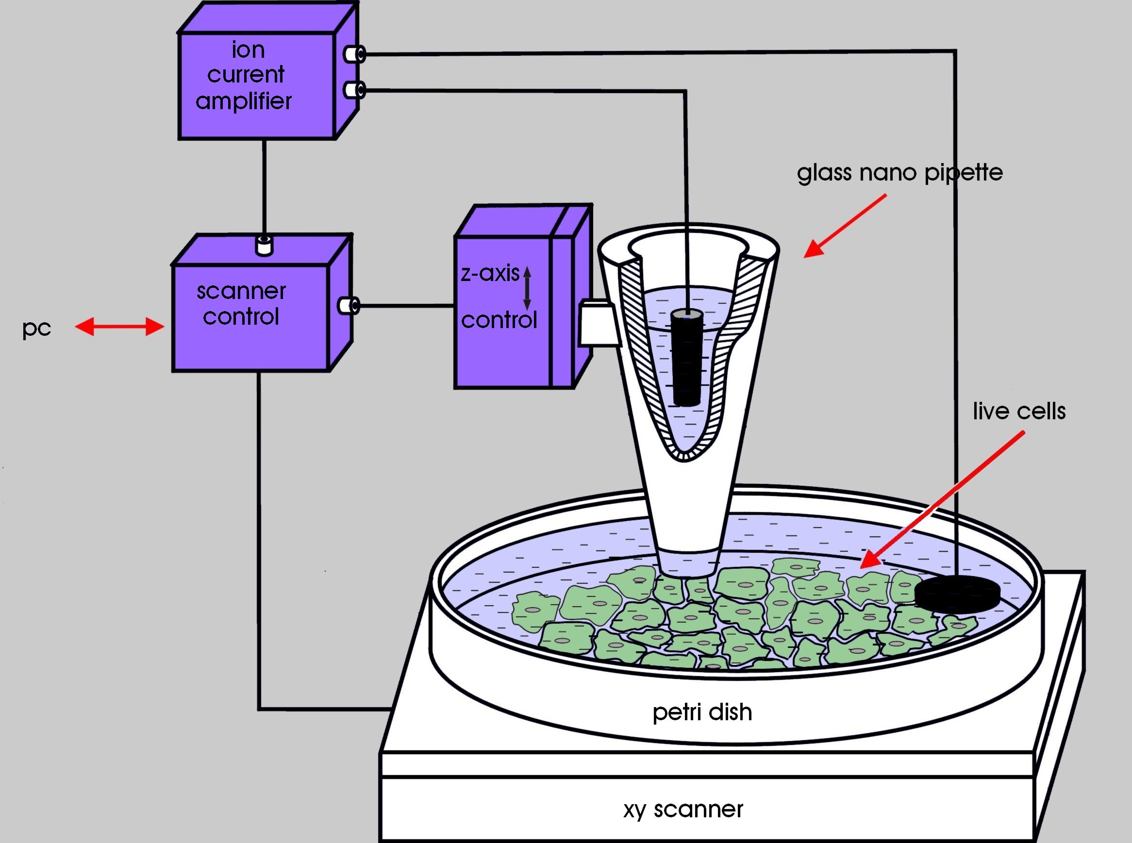 Scanning ion-conductance microscopy diagram